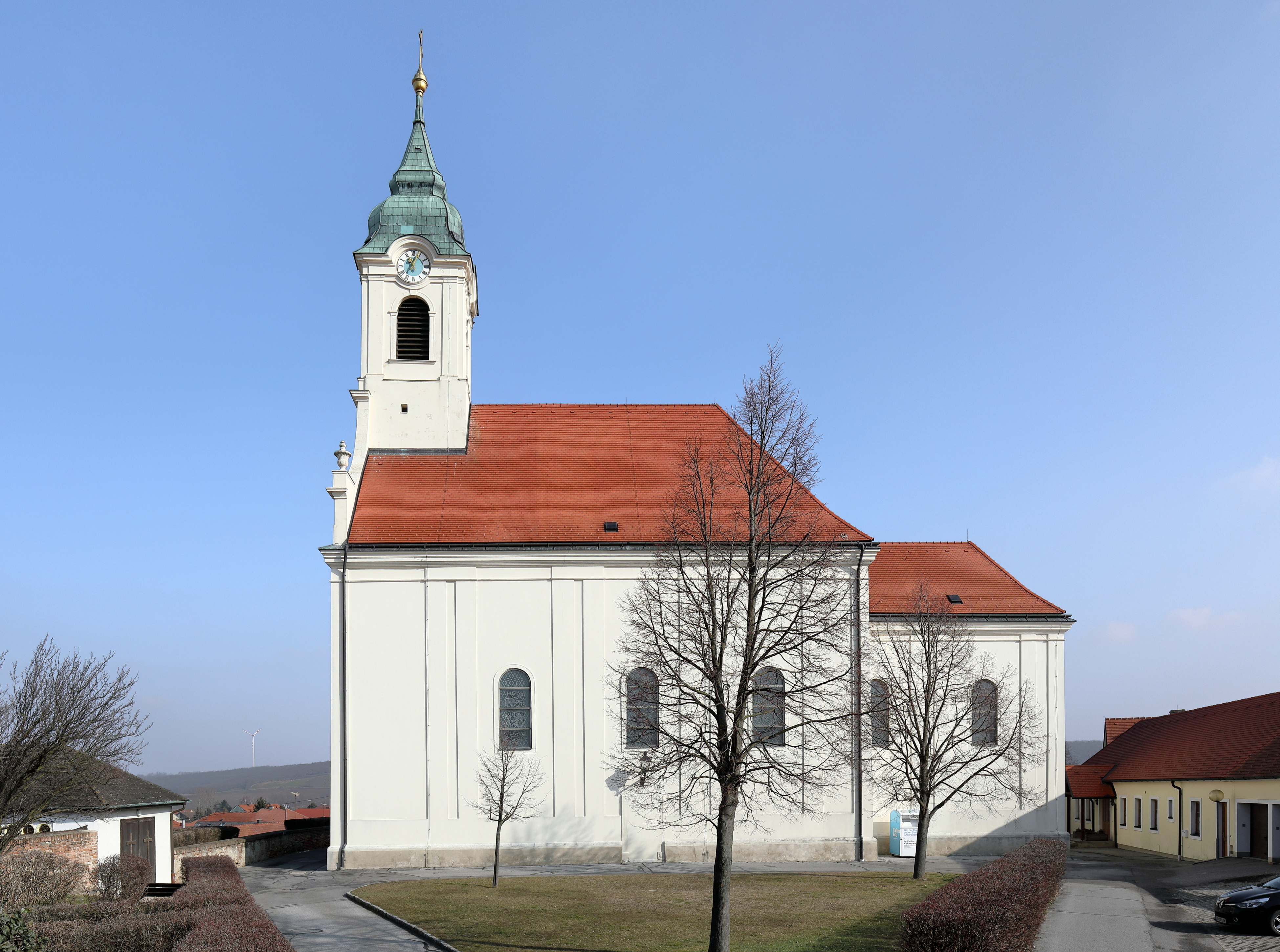 Südwestansicht der röm.-kath. Pfarrkirche hl. Martin in der niederösterreichischen Marktgemeinde Groß-Schweinbarth.Nach schweren Brandschäden (1721) der Vorgängerkirche wurde die Kirche 1934/35 neu errichtet. Der einheitliche Barockbau in erhöhter Lage war ursprünglich von einem bewehrten Friedhof umgeben.